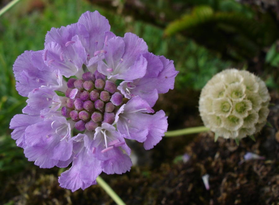 Scabiosa graminifolia, Jardin alpin, Jardin des Plantes de ParisBouba